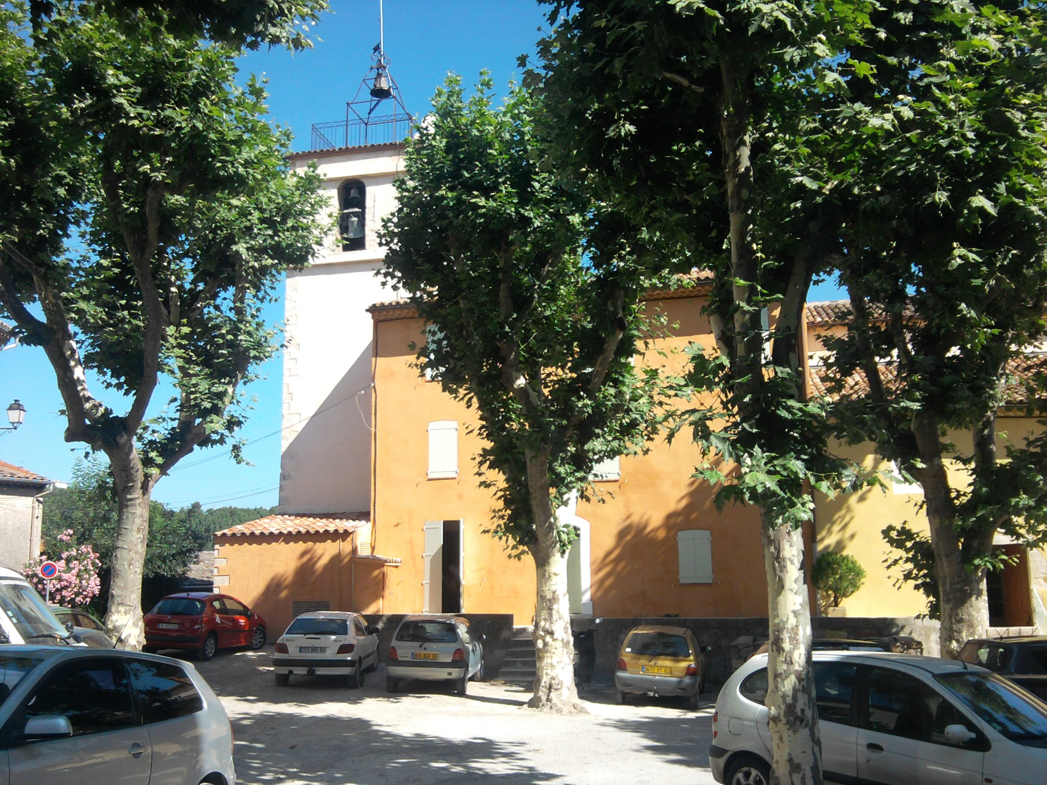 Eglise de Bras (Var), France